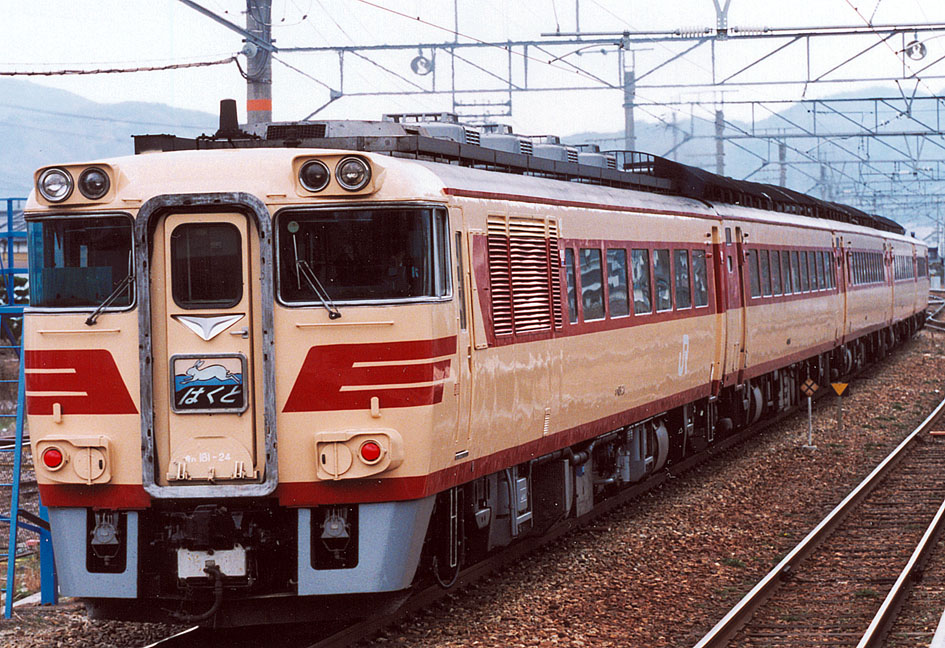 国鉄キハ181系特急「はくと」